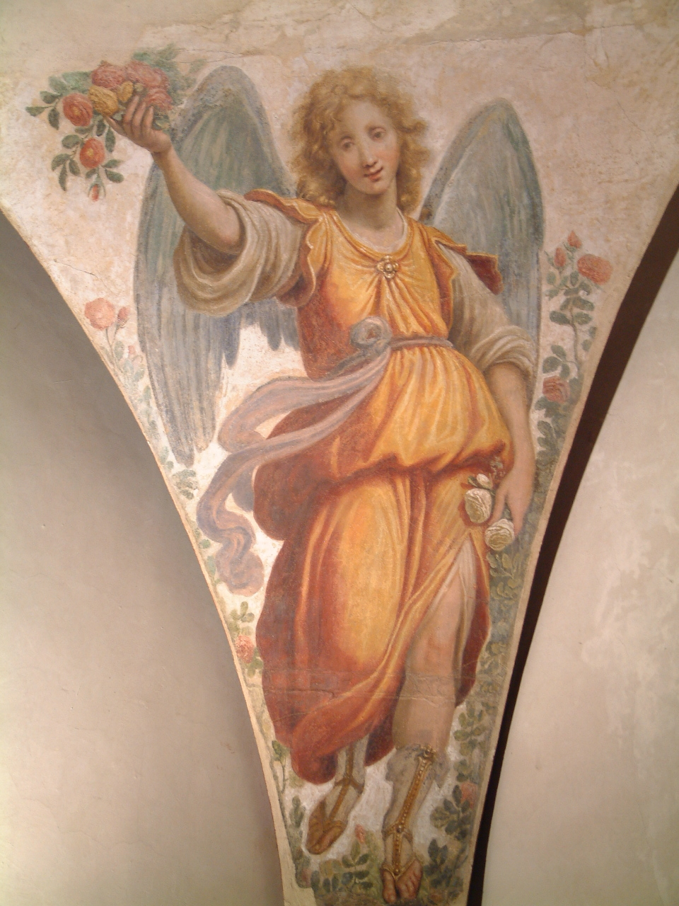 Флоренция. 2006 год. Внутри Санта-Кроче